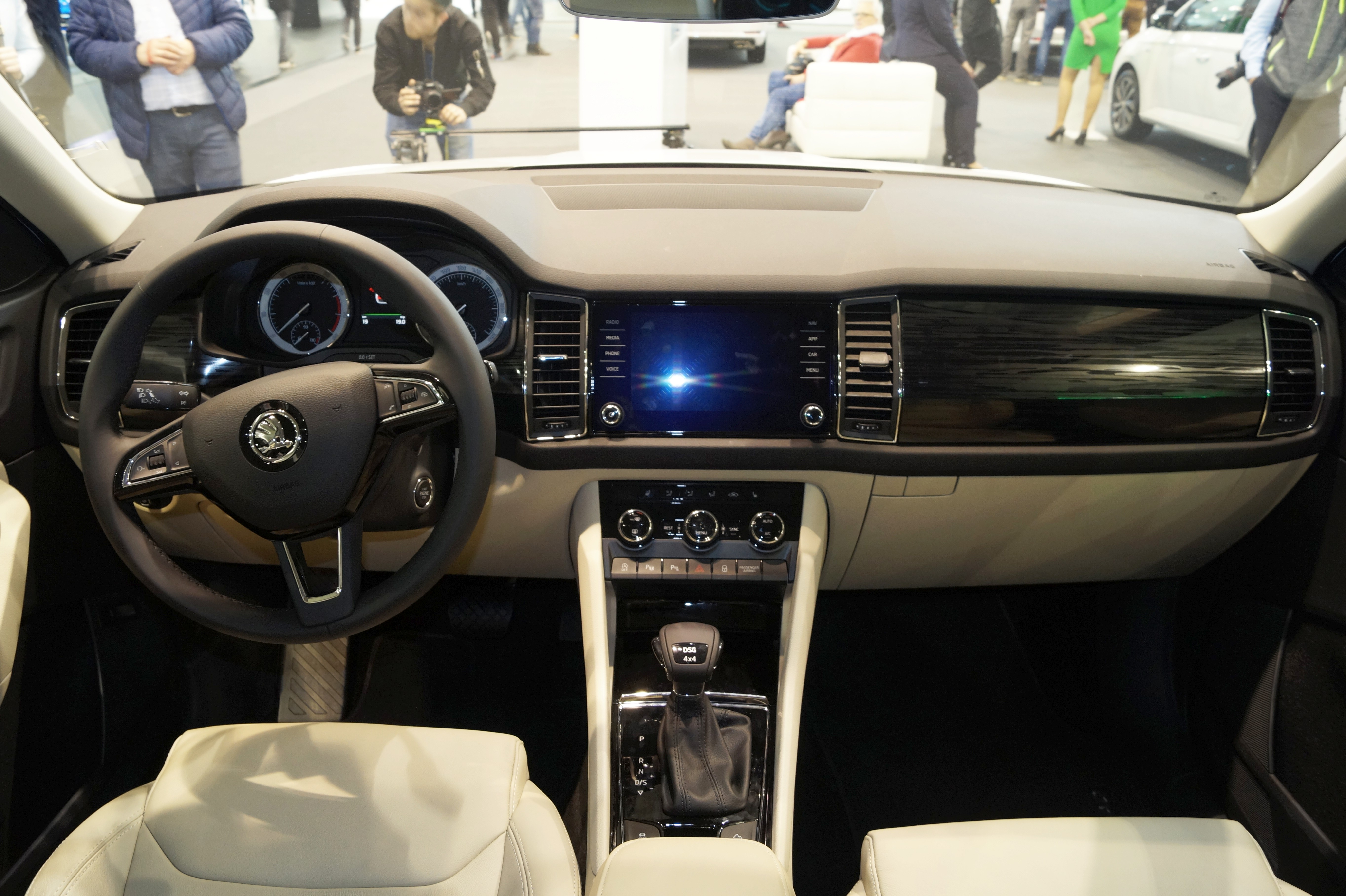 Wnętrze Škody Kodiaq na Motor Show Poznań 2017.